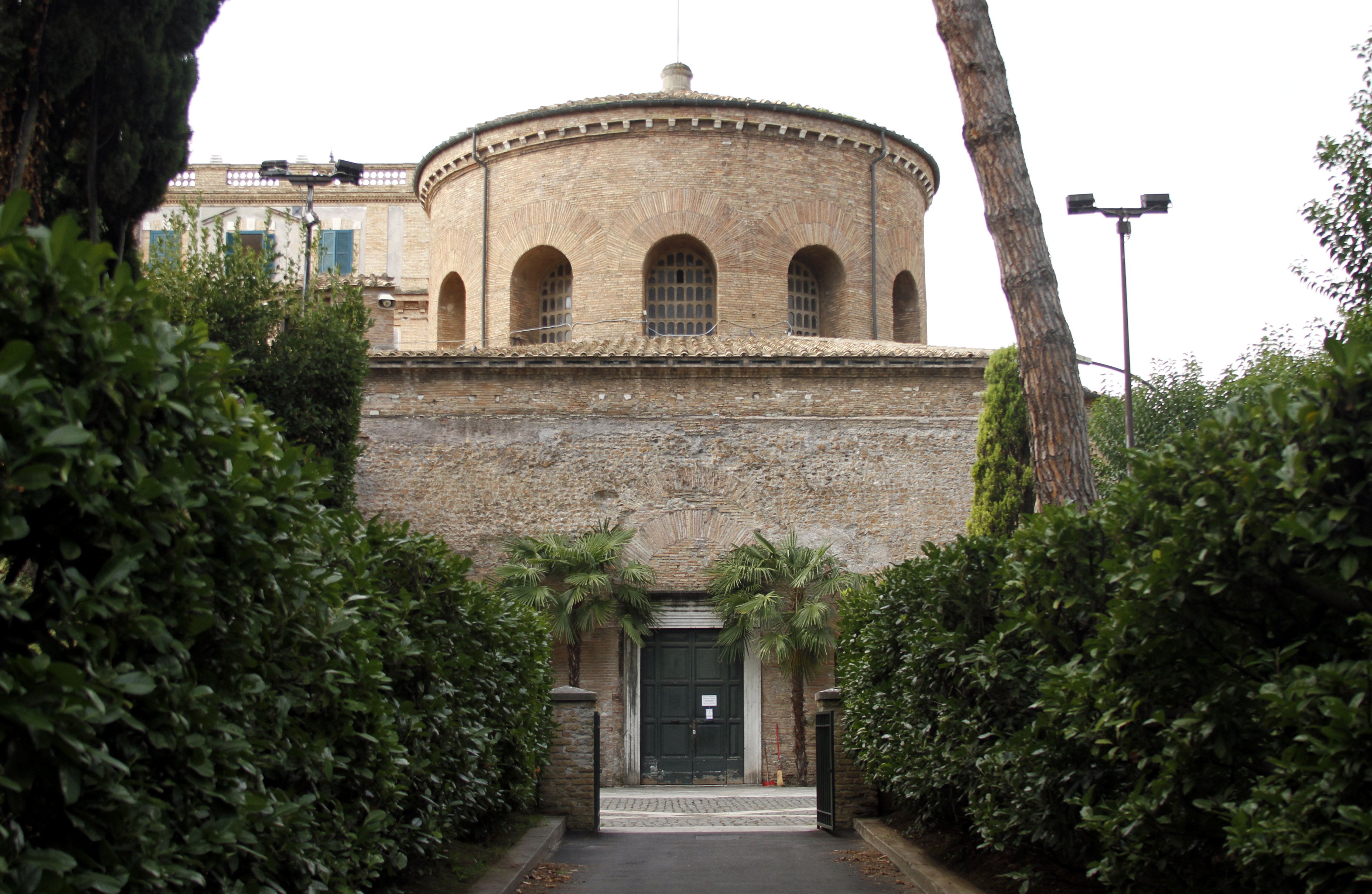 Santa Costanza - Rome